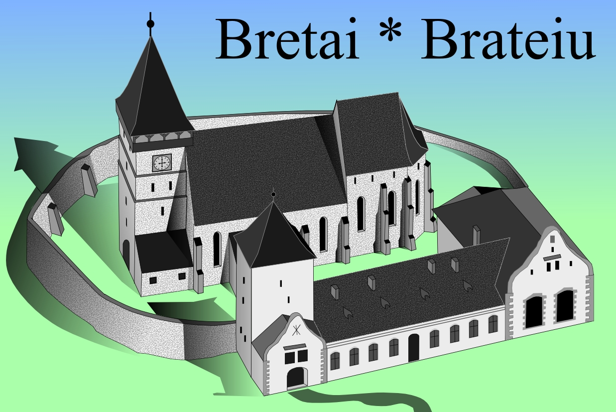 Biserica fortificata din Brateiu